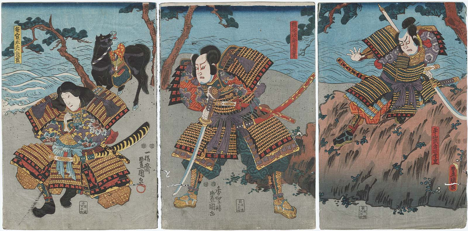 Kabuki Scene from "Ichinotani Futaba Gunki", Act 2 （『一谷嫩軍記』二段目より）